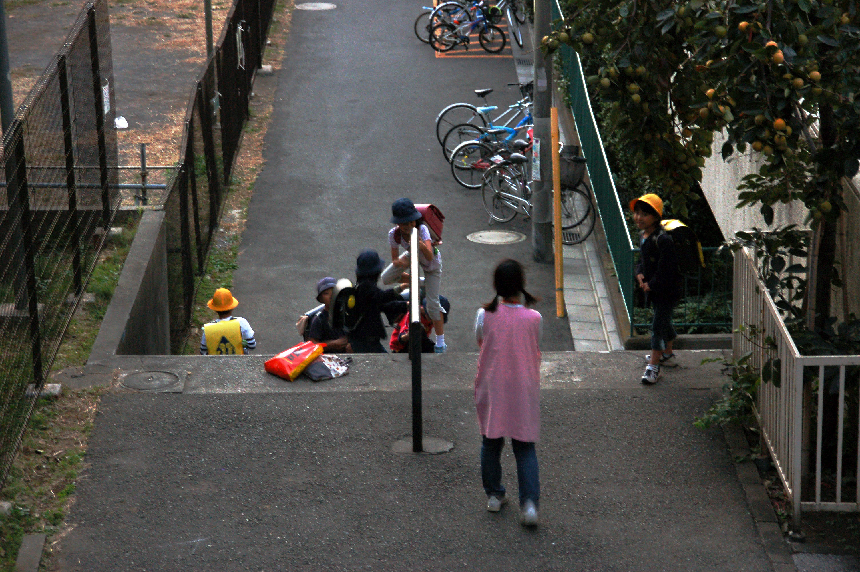 Oct 18, 2006 at 17:15 JST Yanaka, Tokyo (台東区谷中コミュニティセンター)